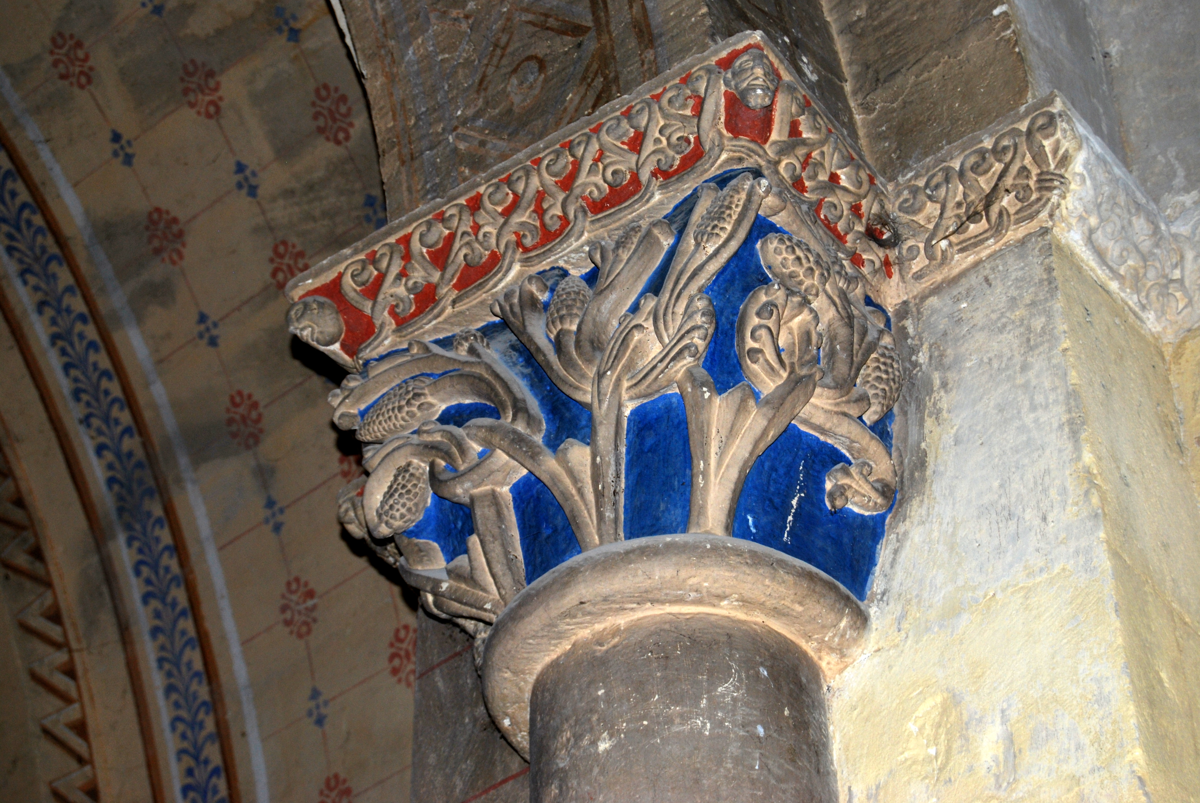 Chapiteaux de l'église Saint-Vincent (Saint-Vincent-de-Pertignas)